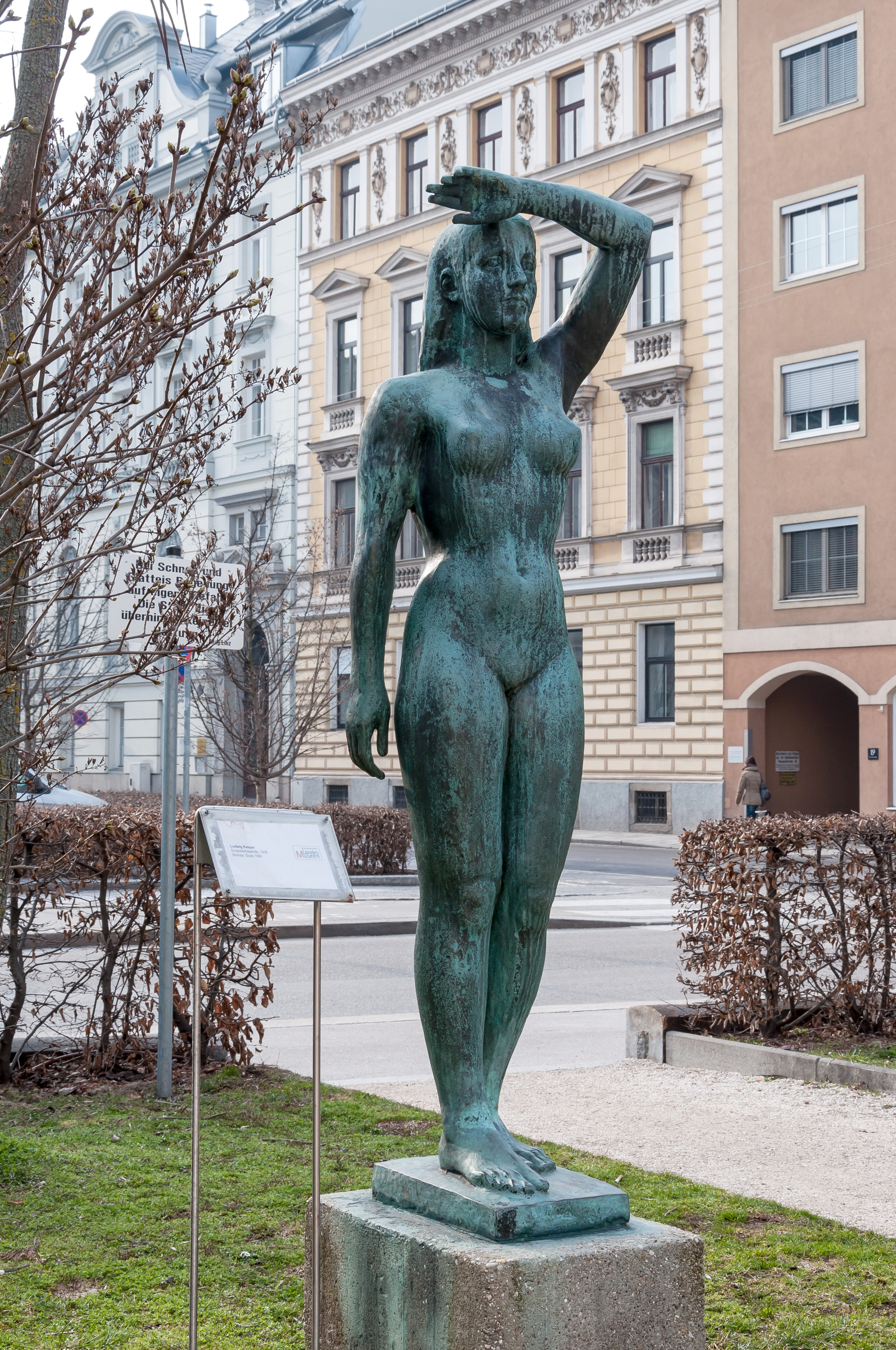 Museumspark: "Emporschauende"